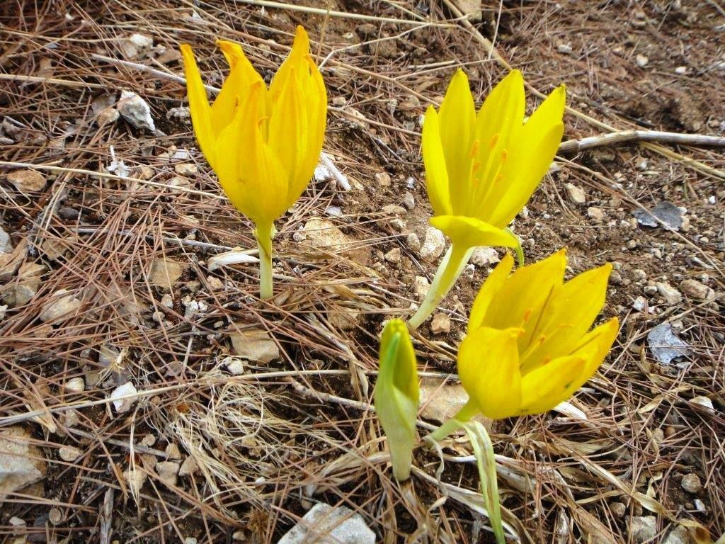 פריחת החלמוניות במורדות המצוקים בנחל ראש פינה